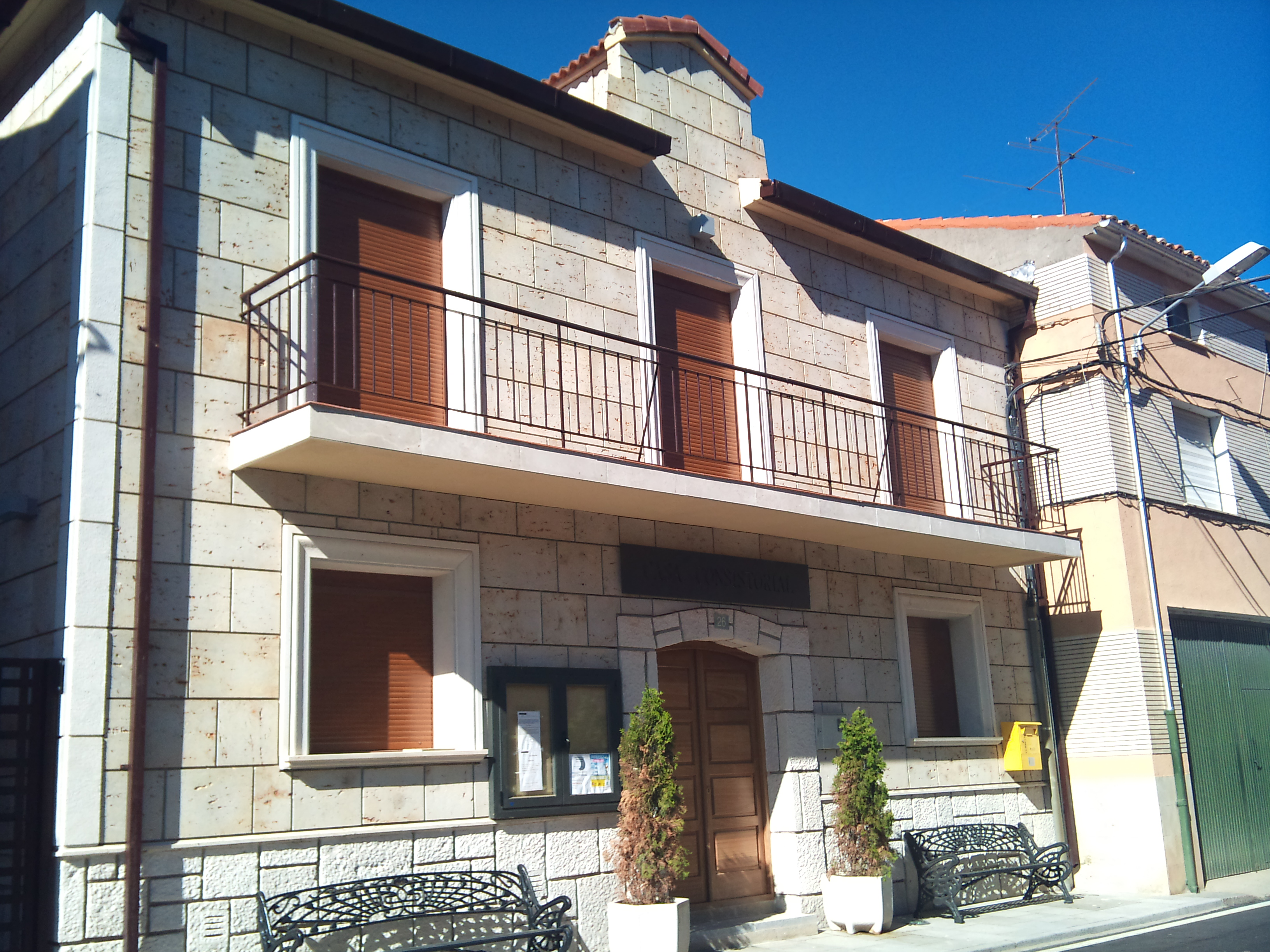 Casa consistorial